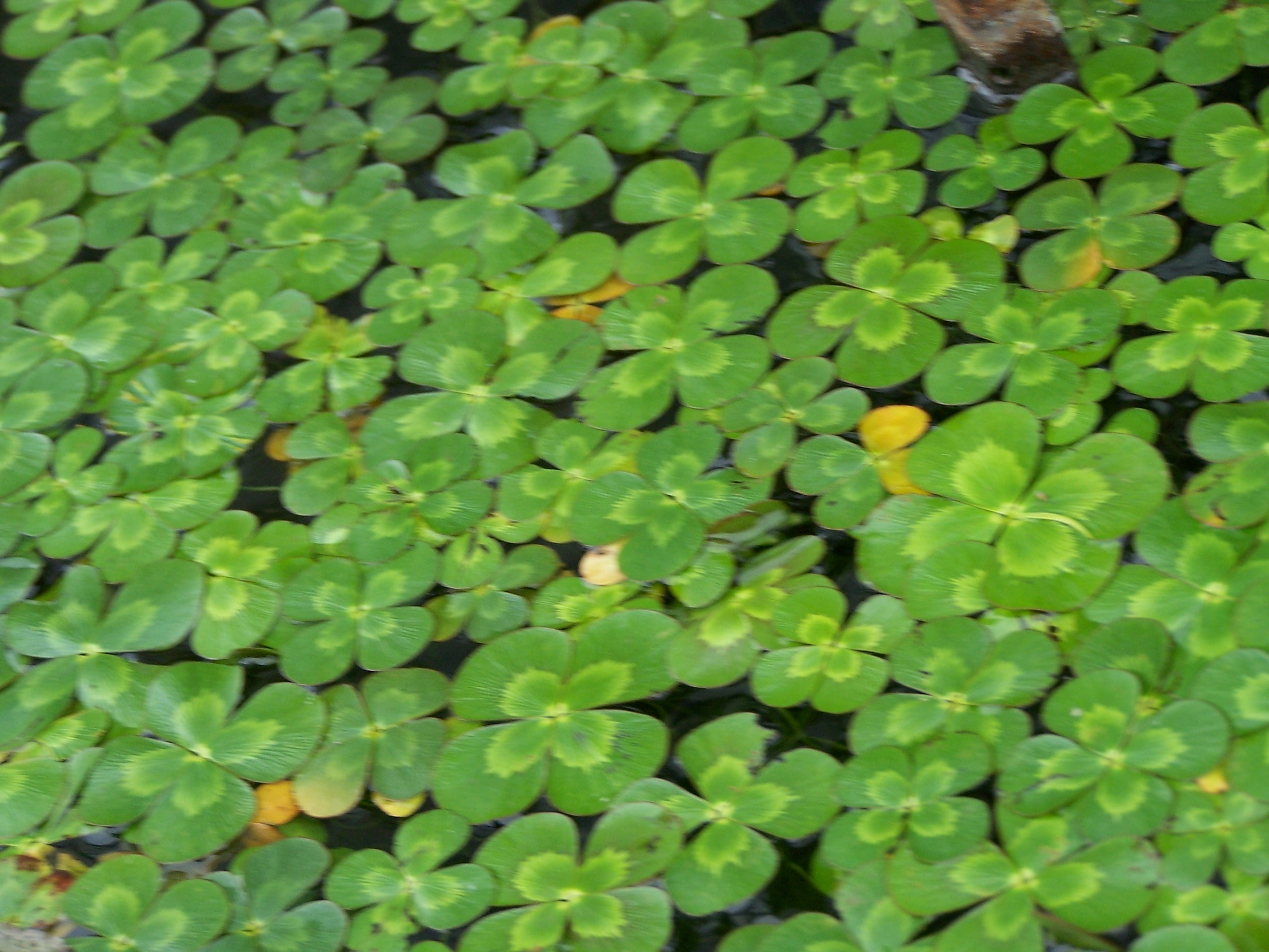 Marsilea mutica 17 juin 2006 Vieux jardin botanique de Göttingen